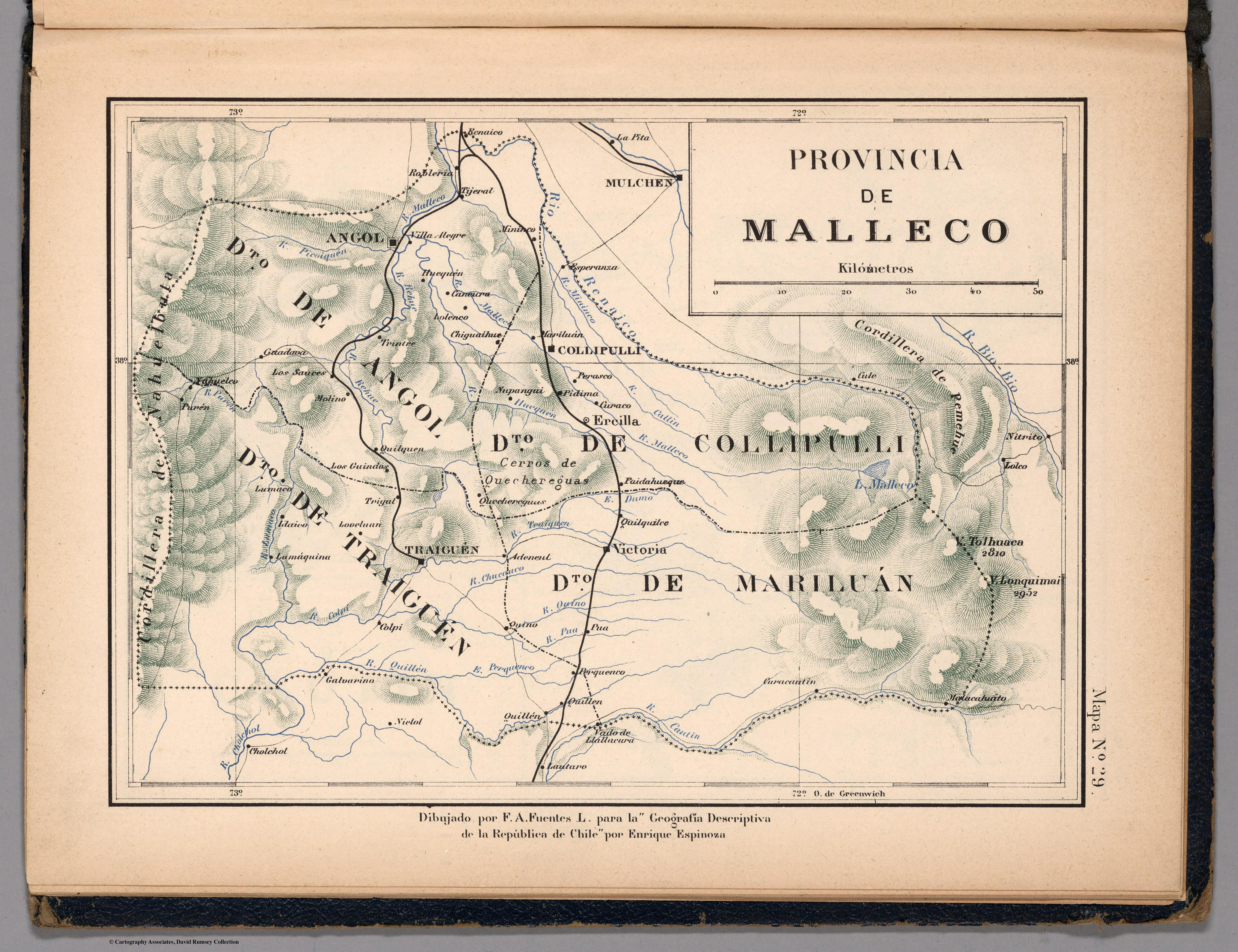 Atlas de Chile Arreglado para la Jeografia Descriptiva de la Republica de Chile por Enrique Espinoza.